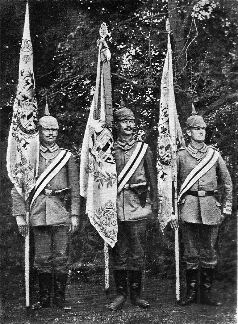 Die Fahnen des Regiments vor dem Abtransport in die Heimat